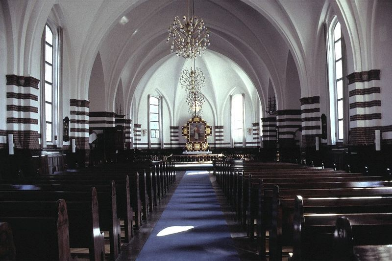 Filips Kirke i Danmark. Skibet set mod øst